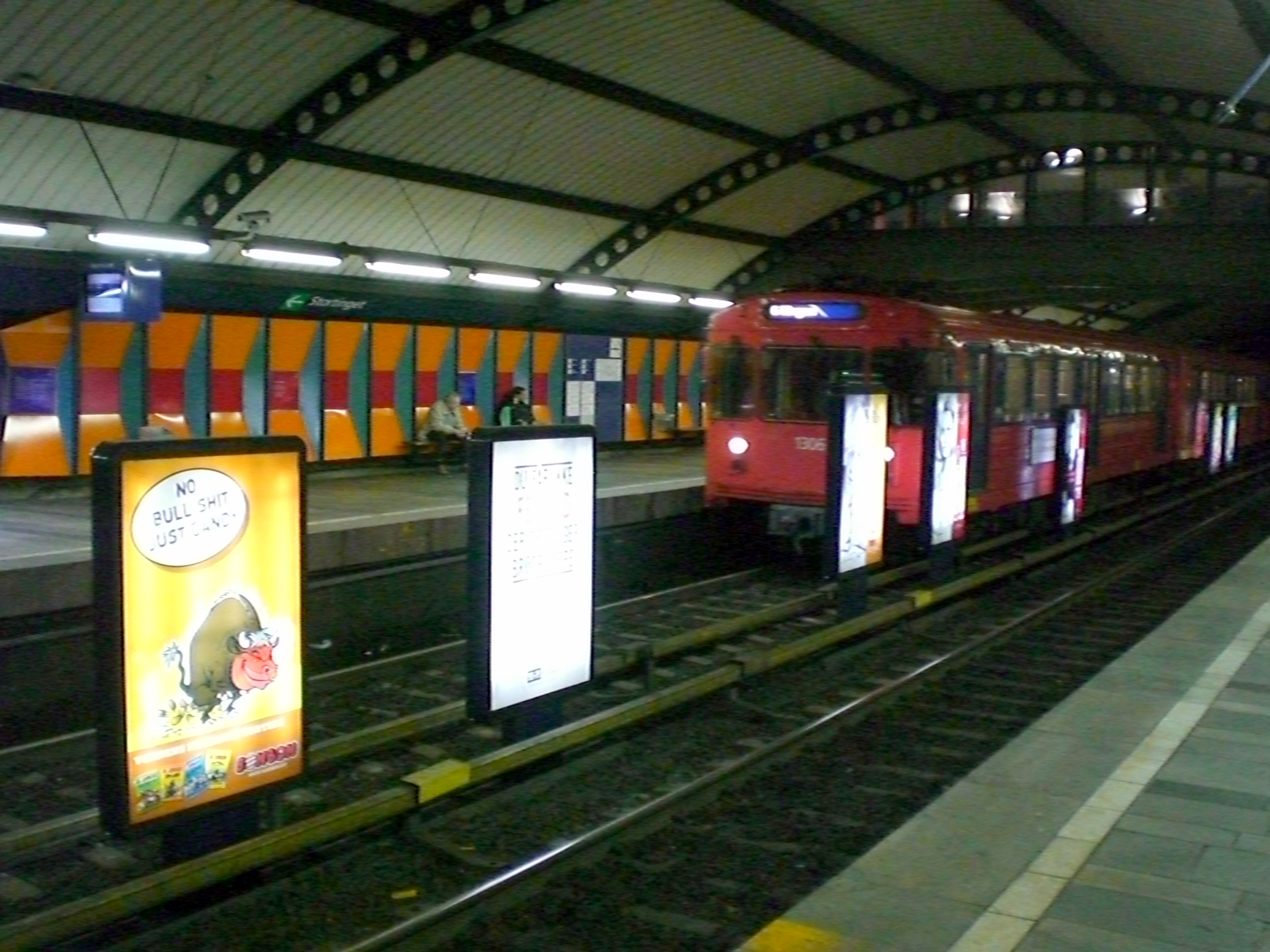 Stortinget stasjon på T-banen i Oslo